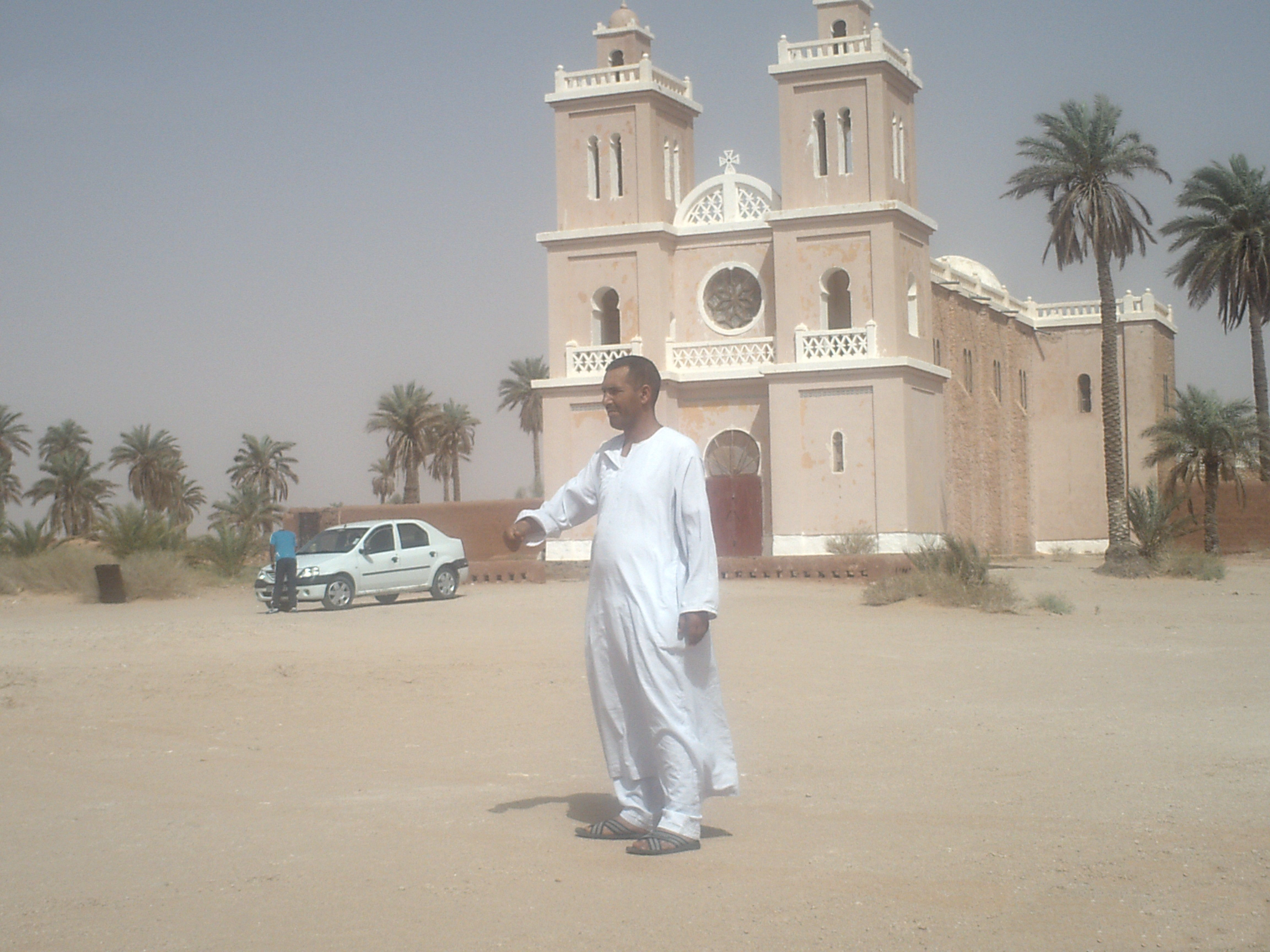 Eglise construite par le Père de Foucauld à El-Goléa au Sud Algérien à environ 800 km d'Alger la capitale.